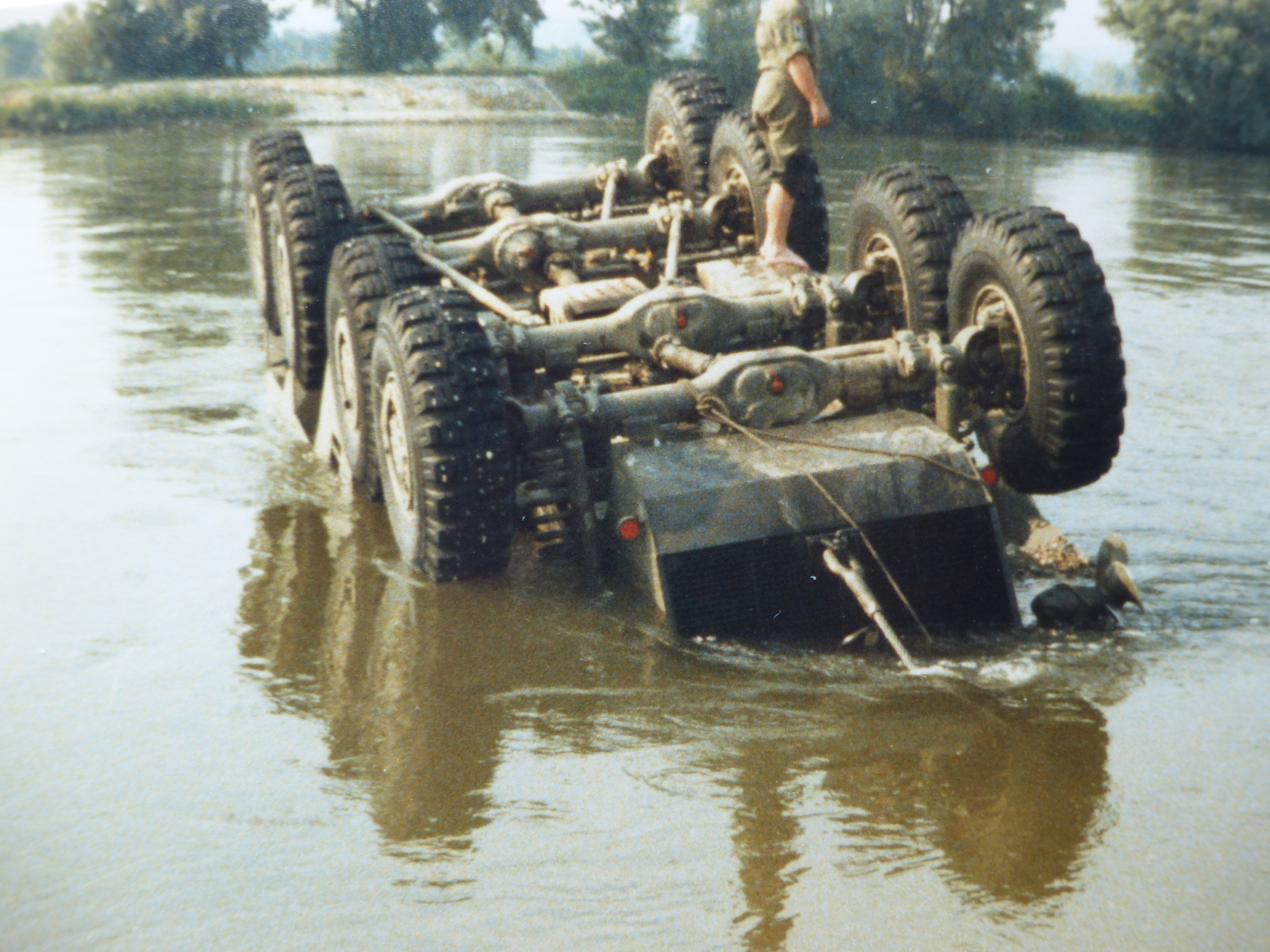 1986-07-18 Luchs wird aus der Donau gezogen